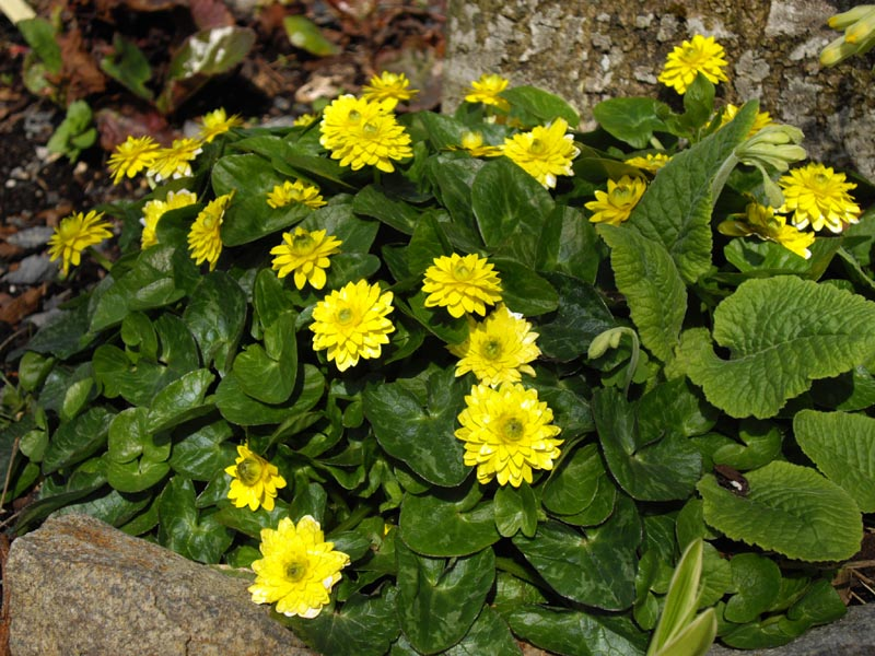 Ranunculus ficaria 'Flore pleno'